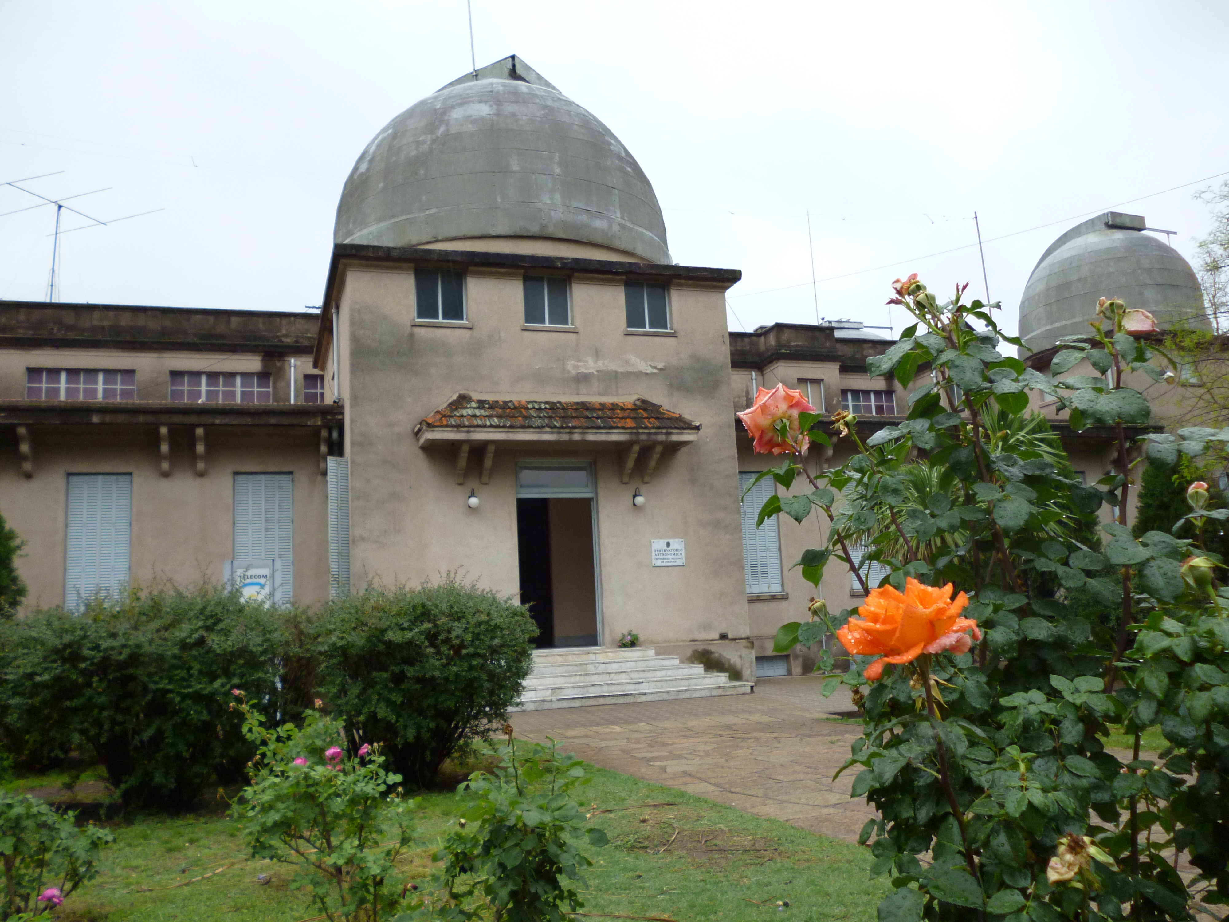 Fachada principal del Observatorio astronómico de Córdoba (Argentina).